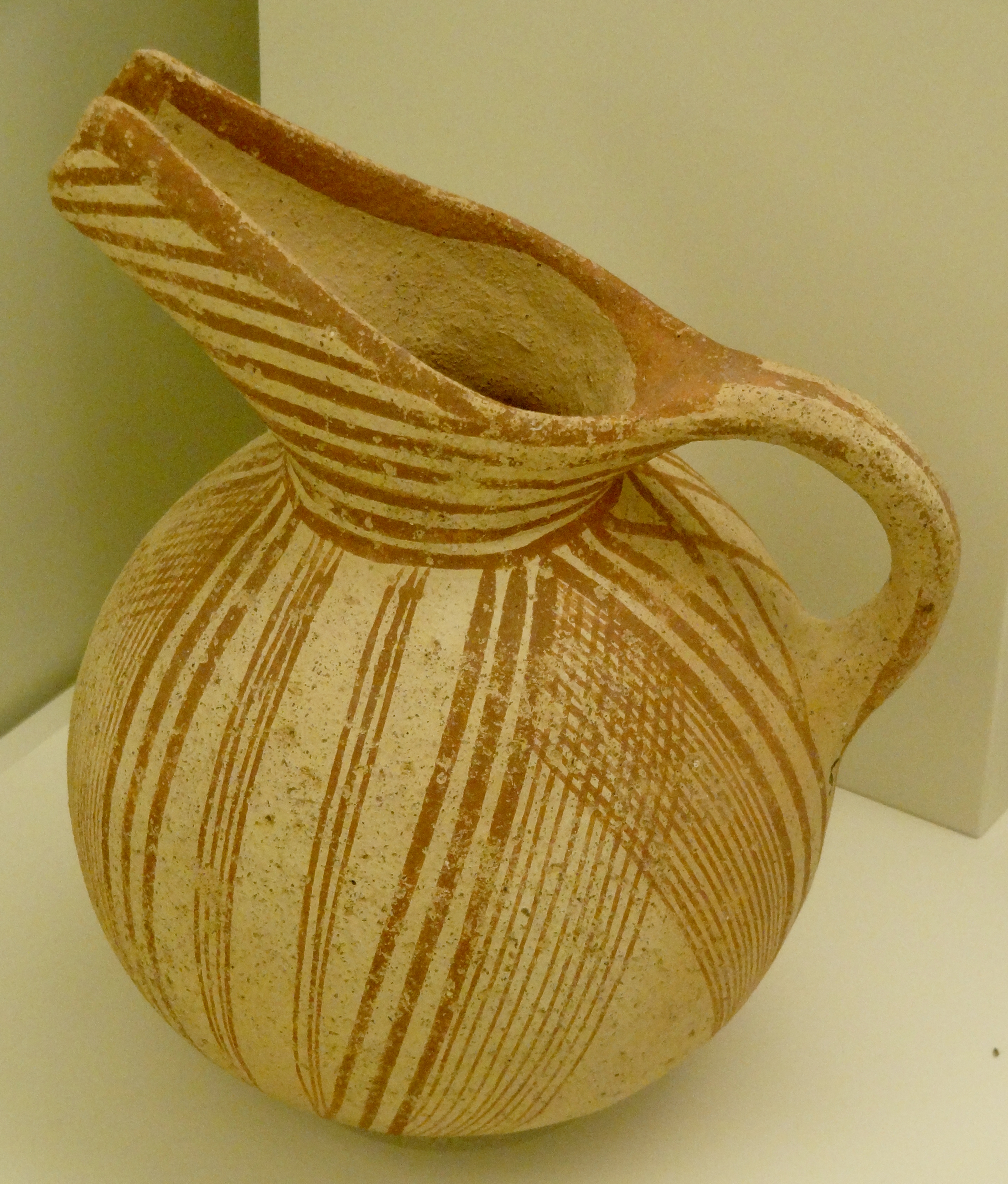 Kürbisförmiger Tonkrug (Vorpalastzeit, 2700–2300 v. Chr.) aus Agios Onoufrios (Festos), ausgestellt im Archäologischen Museum Iraklio, Kreta, Griechenland